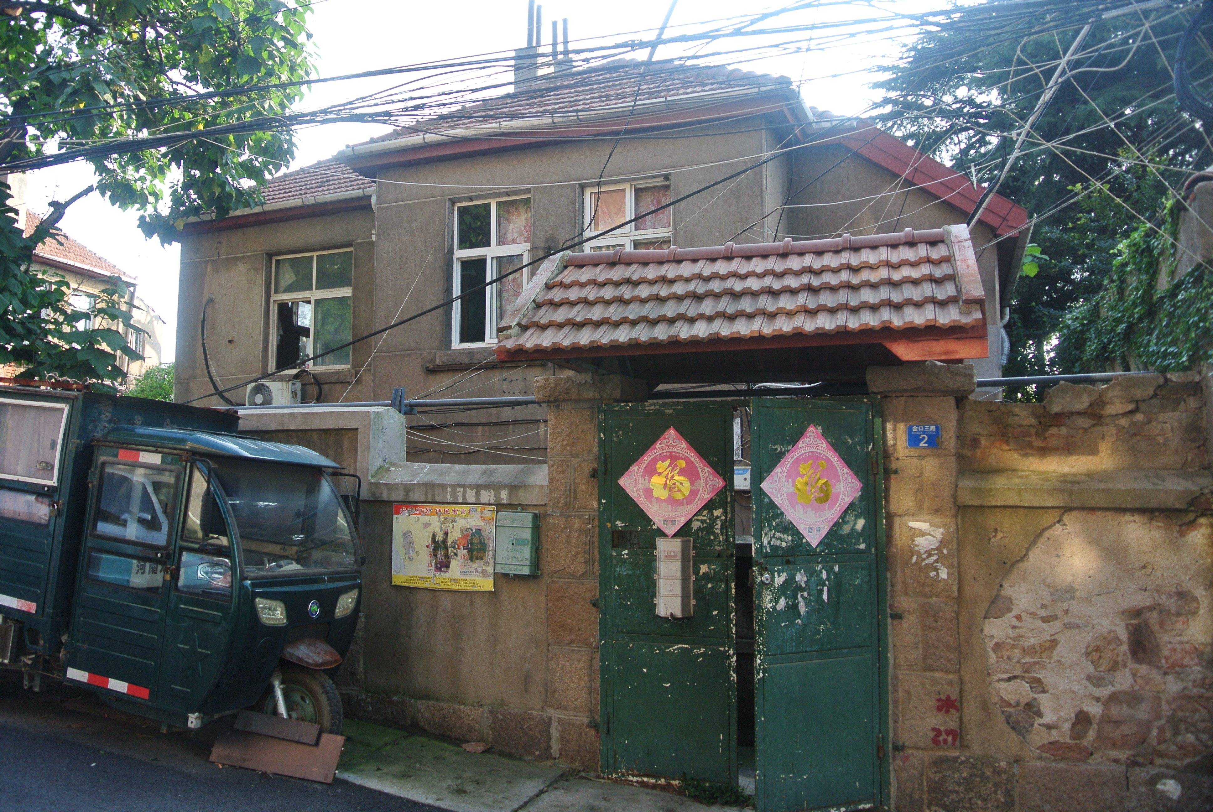 青岛金口三路2号（门牌号可能曾为金口三路2号乙，老舍1935年曾在此居住）